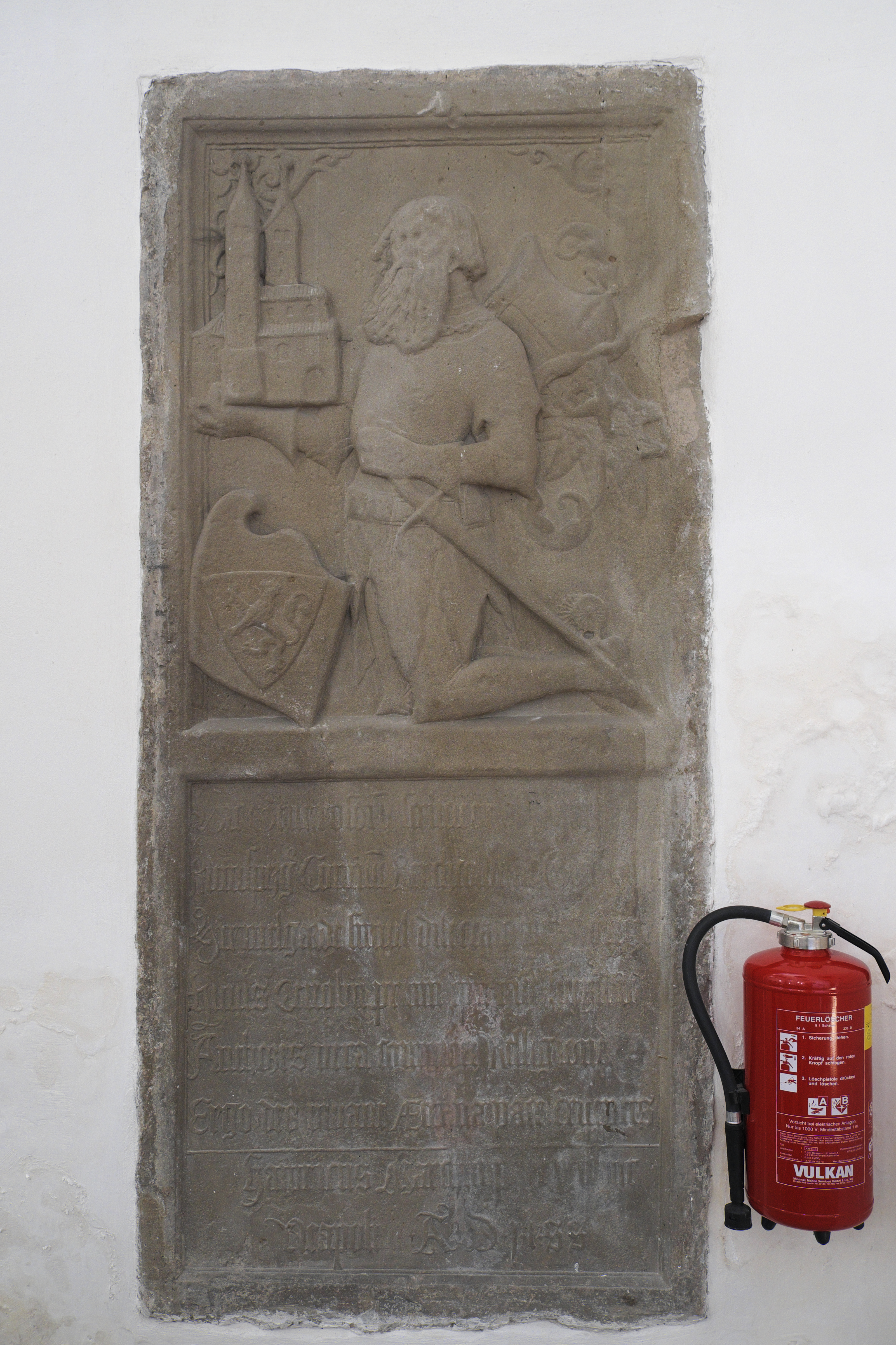 Ehemalige Benediktinerklosterkirche, heute katholische Pfarrkirche Mariä Himmelfahrt und Peter und Paul, in Irsee im Landkreis Ostallgäu in Schwaben (Bayern/Deutschland), Epitaph